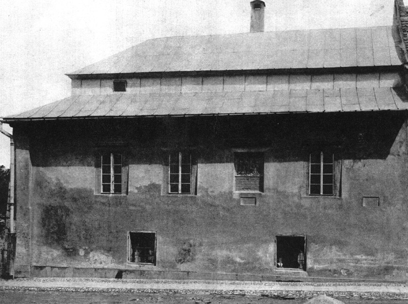 Dom Długosza, Kraków. Fotografia Ignacego Kriegera, ok. 1880